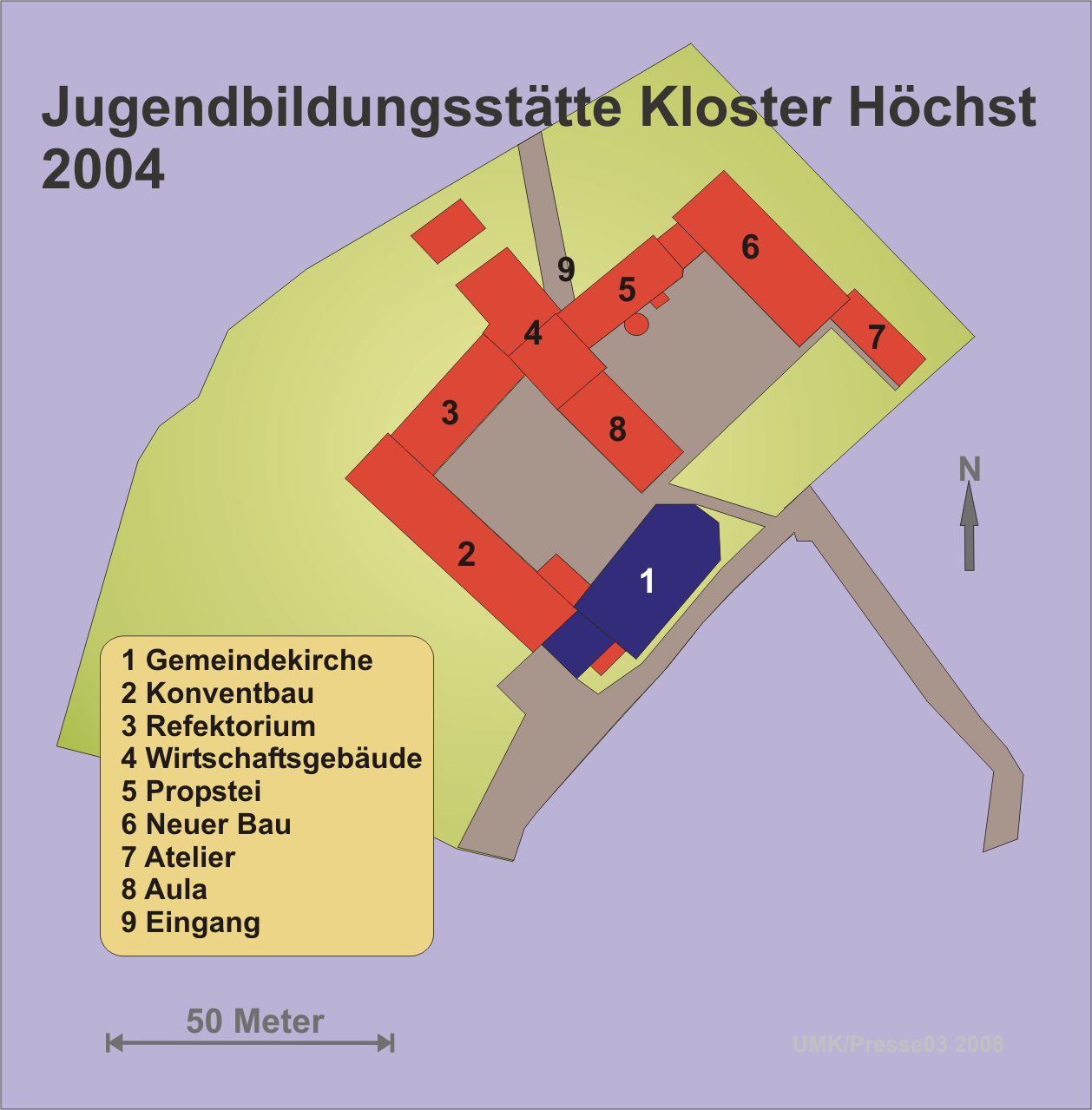 Jugendbildungsstätte Kloster Höchst im Odenwald, Hessen 2004 im ehemaligen Kloster Höchst von 1200